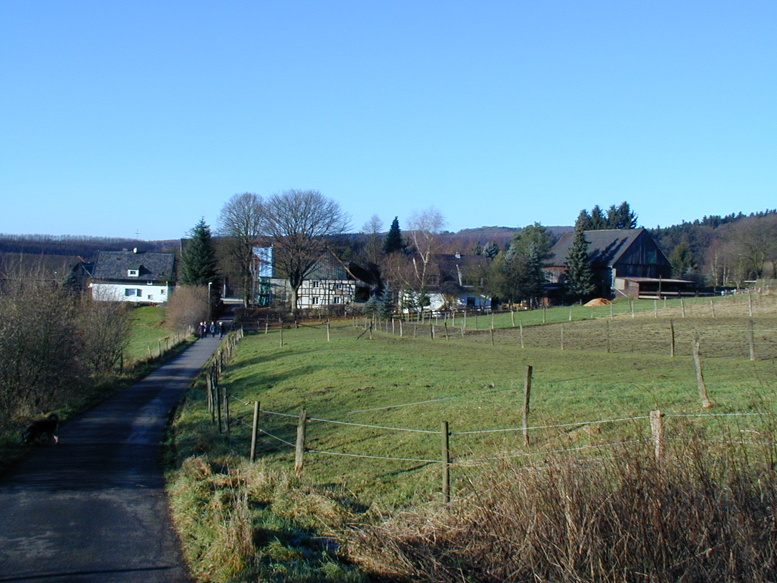 Schwelm-Weuste, 2001